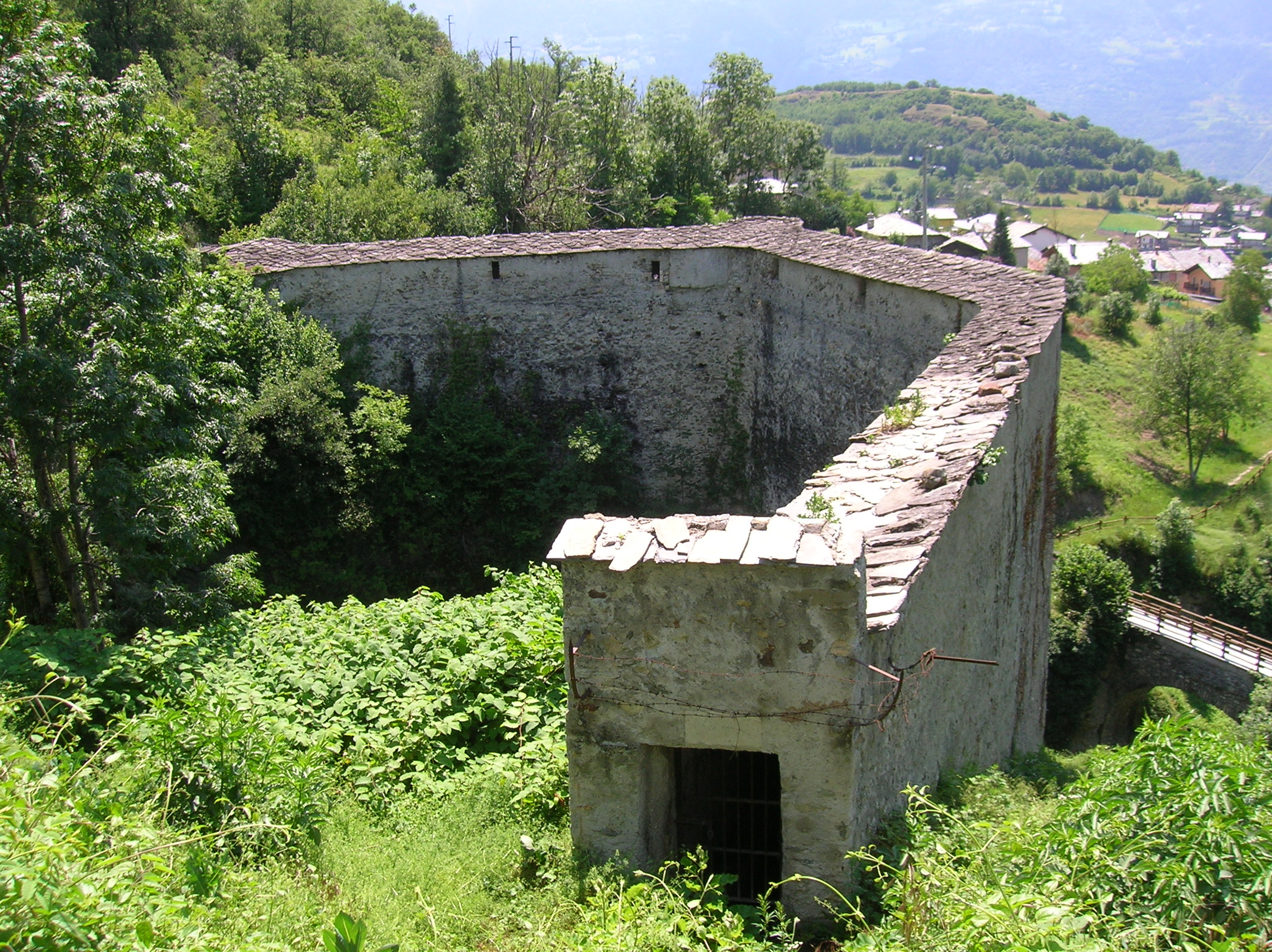 Ponte acquedotto di Grand Arvou, Aosta, Italia.